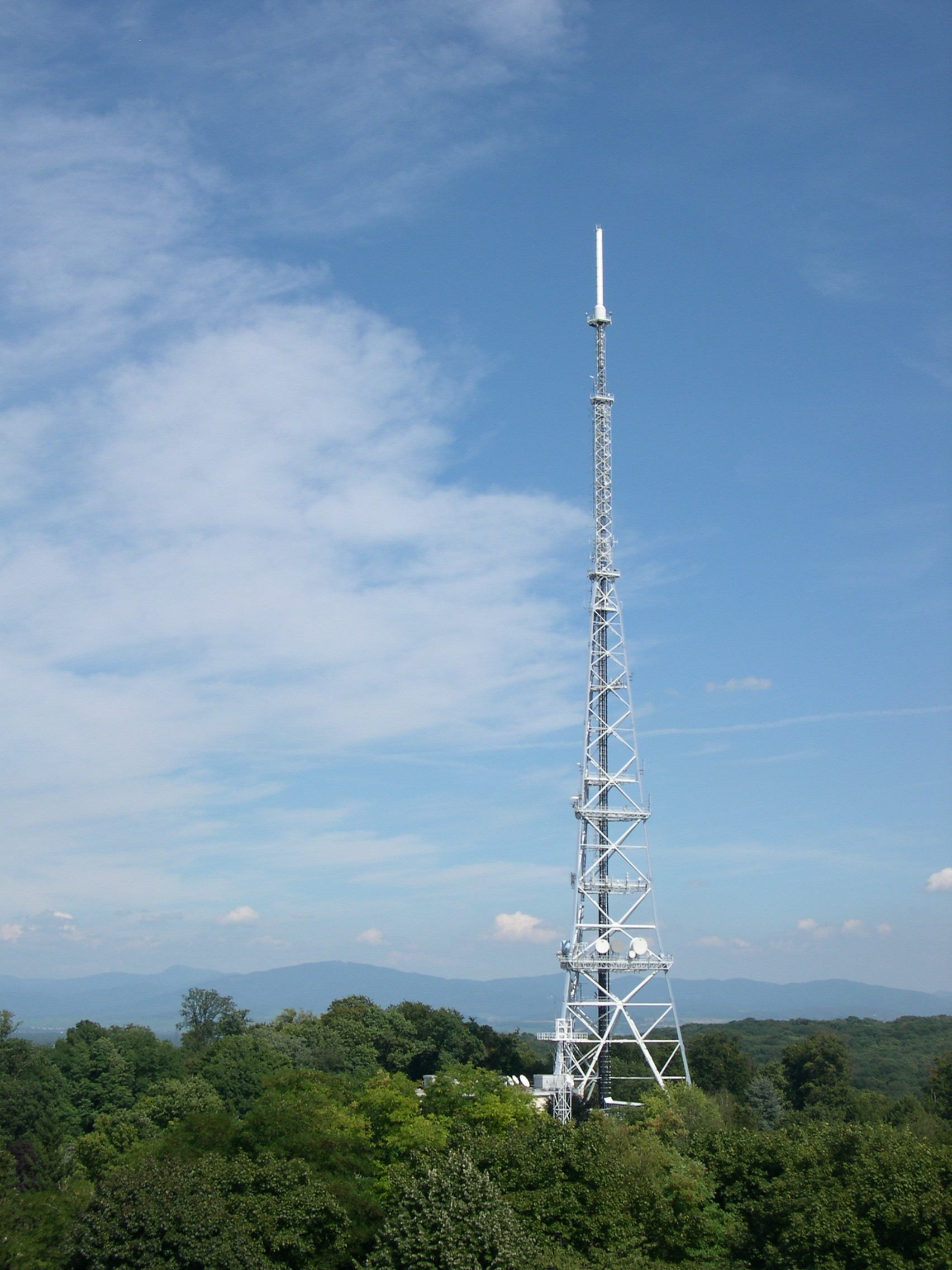 Vue sur la tour, type pylône tripode pour TV-Radio-télécom, de TdF de Mulhouse 68 (en arrière plan la Forêt Noire) prise depuis la Tour du Belvédère.